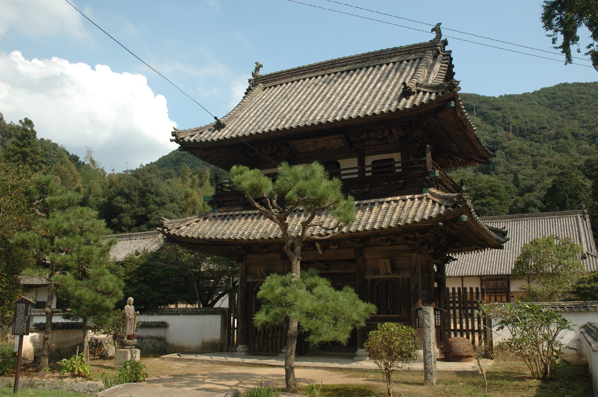 Sanmon gate